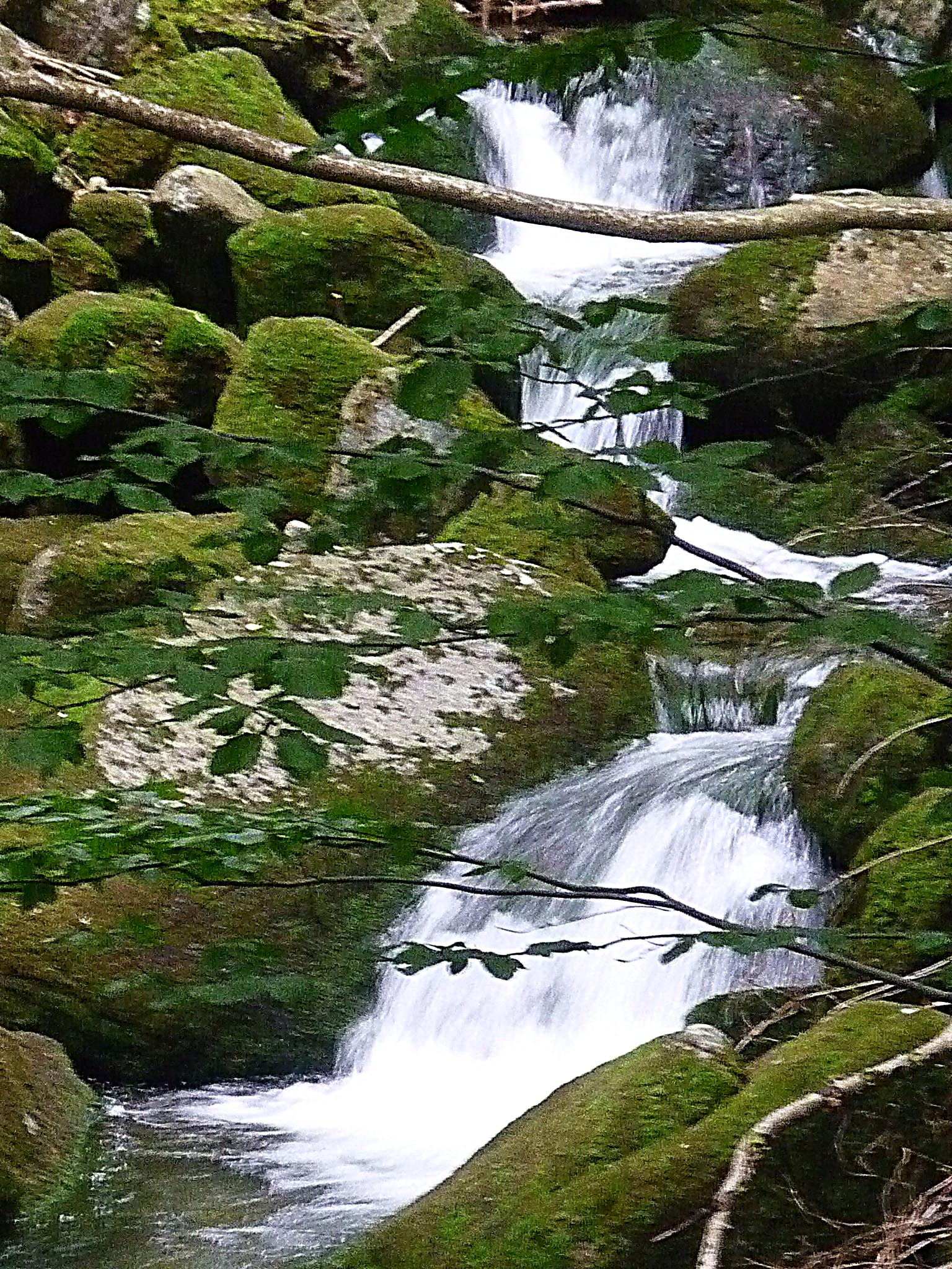 Turmwasserfälle (Wrzosówka) bei Agnetendorf (Jagniątków) im Riesengebirge